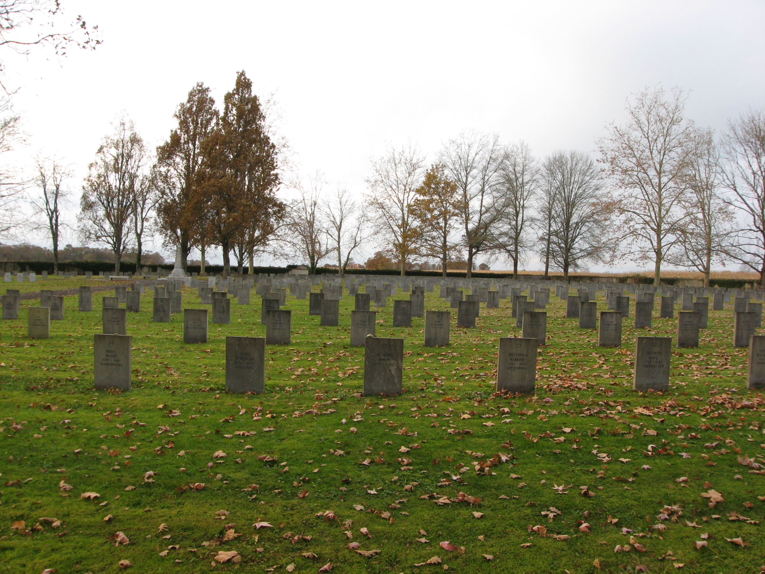 Tombes juives du camp de Gurs (Pyrénées-Atlantiques) (Pyrénées).